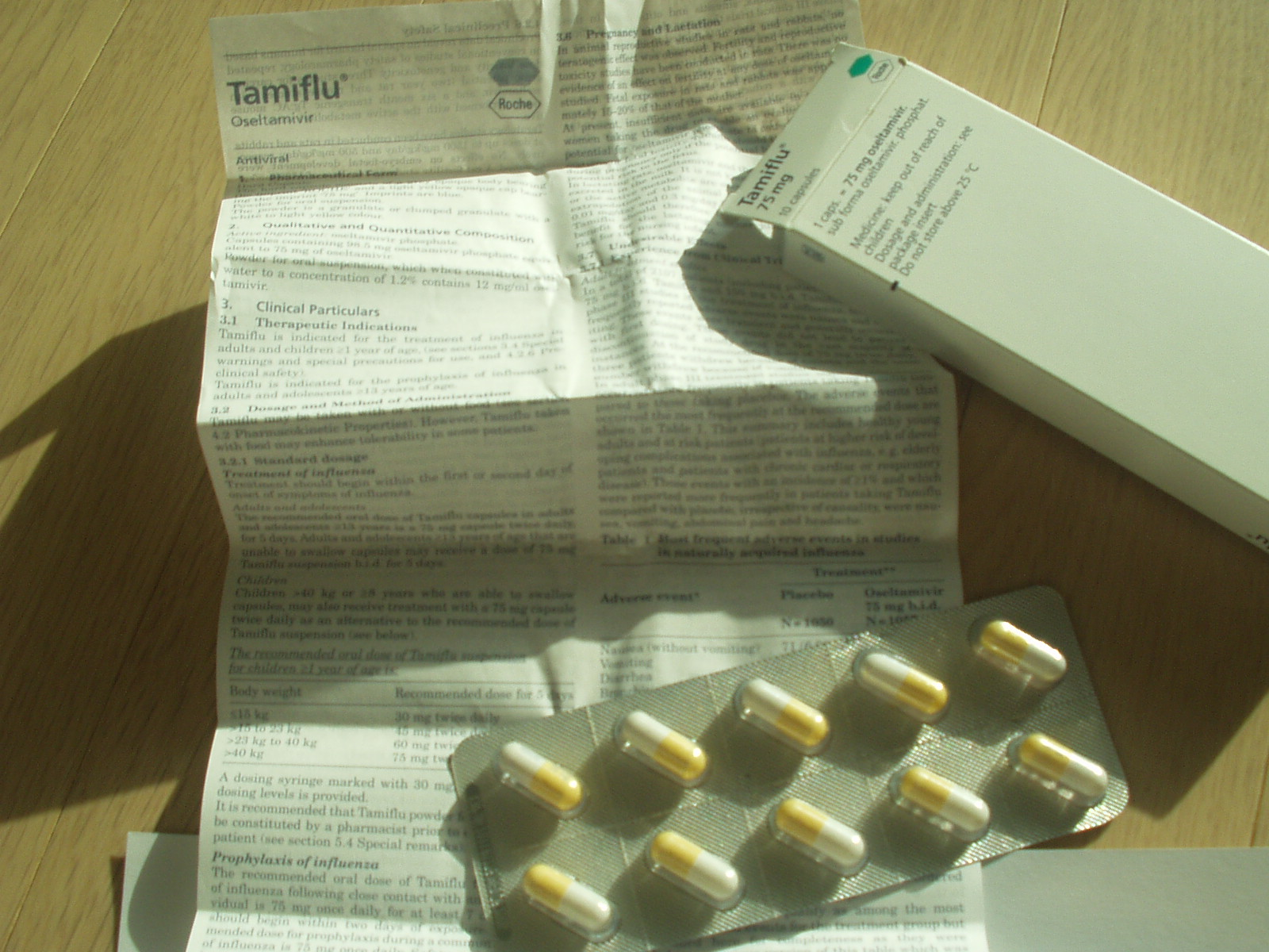 타미플루(Tamiflu)의 복용 설명서, 의약품, 케이스 등